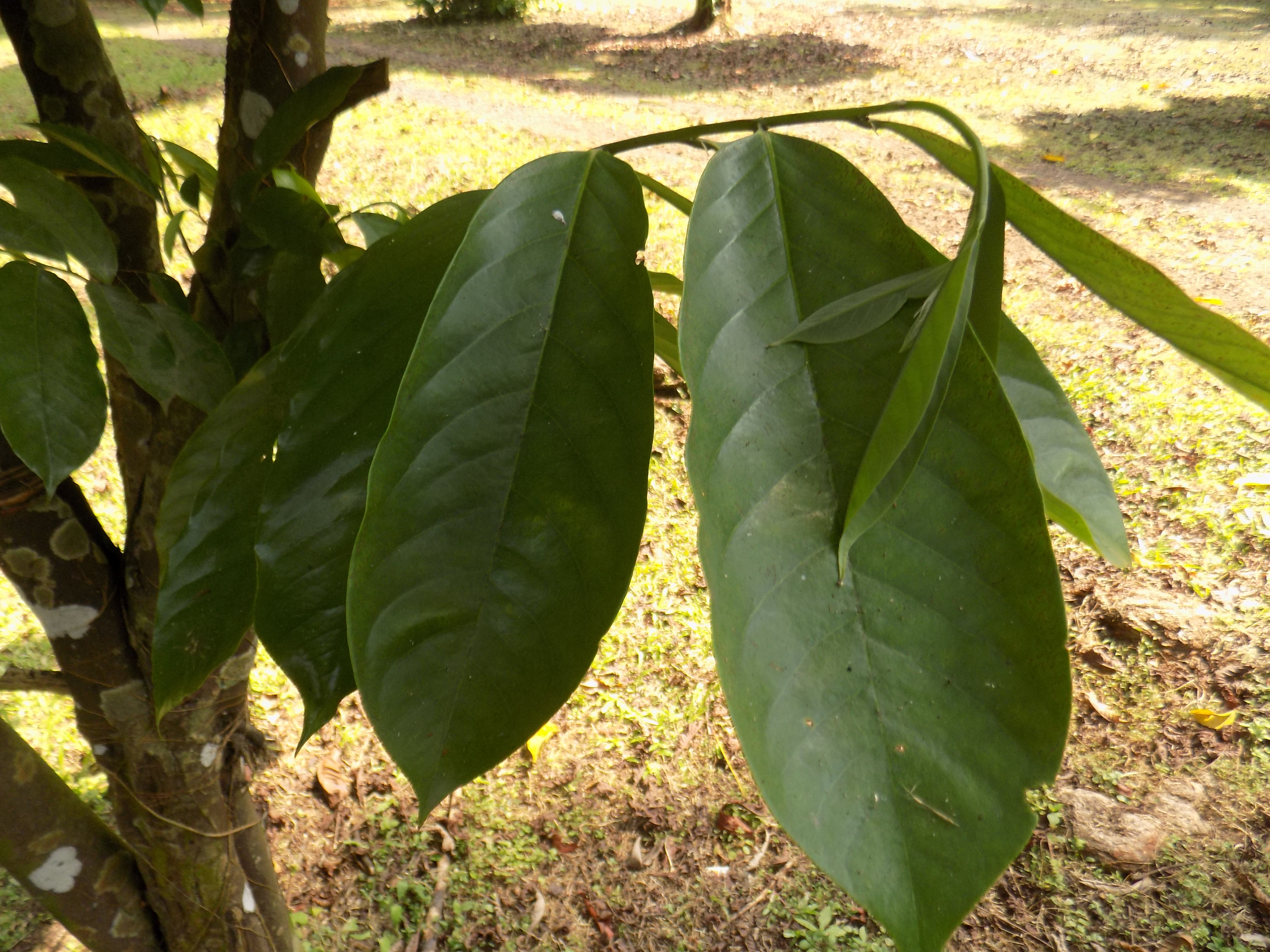 Annickia chlorantha est une espèce d'arbres de la famille des Anacardiacées, que l’on retrouve dans les forêts humides d'Afrique tropicale, notamment au Cameroun et au Nigeria. Jardin botanique de Limbé, Région du Sud-Ouest, Cameroun